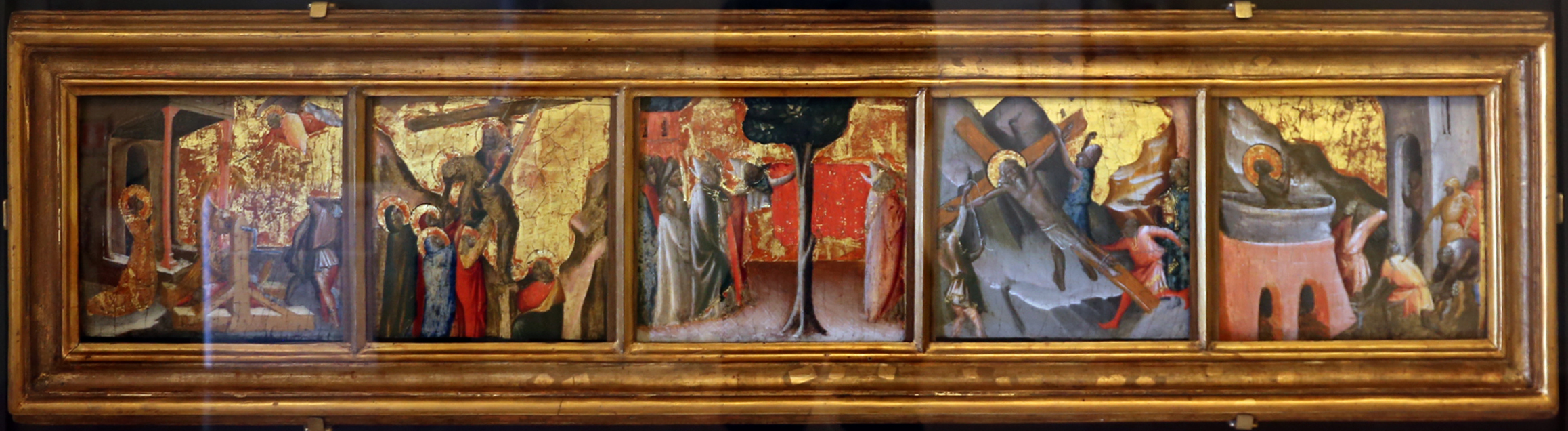 Palazzo dei Musei (Modena) This is a photo of a monument which is part of cultural heritage of Italy.